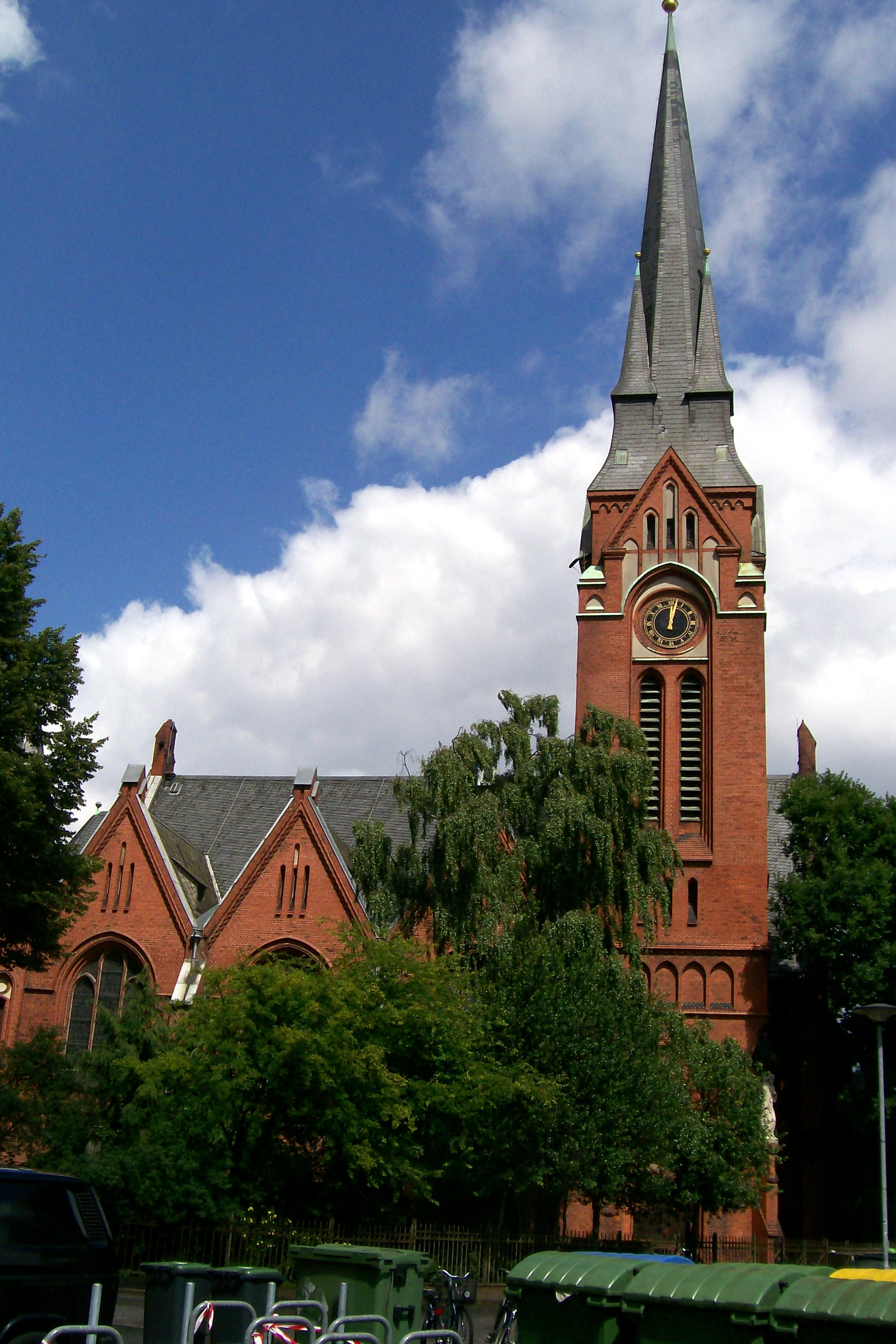 Church St. Lorenz, Lübeck from 1900 in Lübeck-St. Lorenz, Schleswig-Holstein, Germany, view from Lübeck Hauptbahnhof (main station)